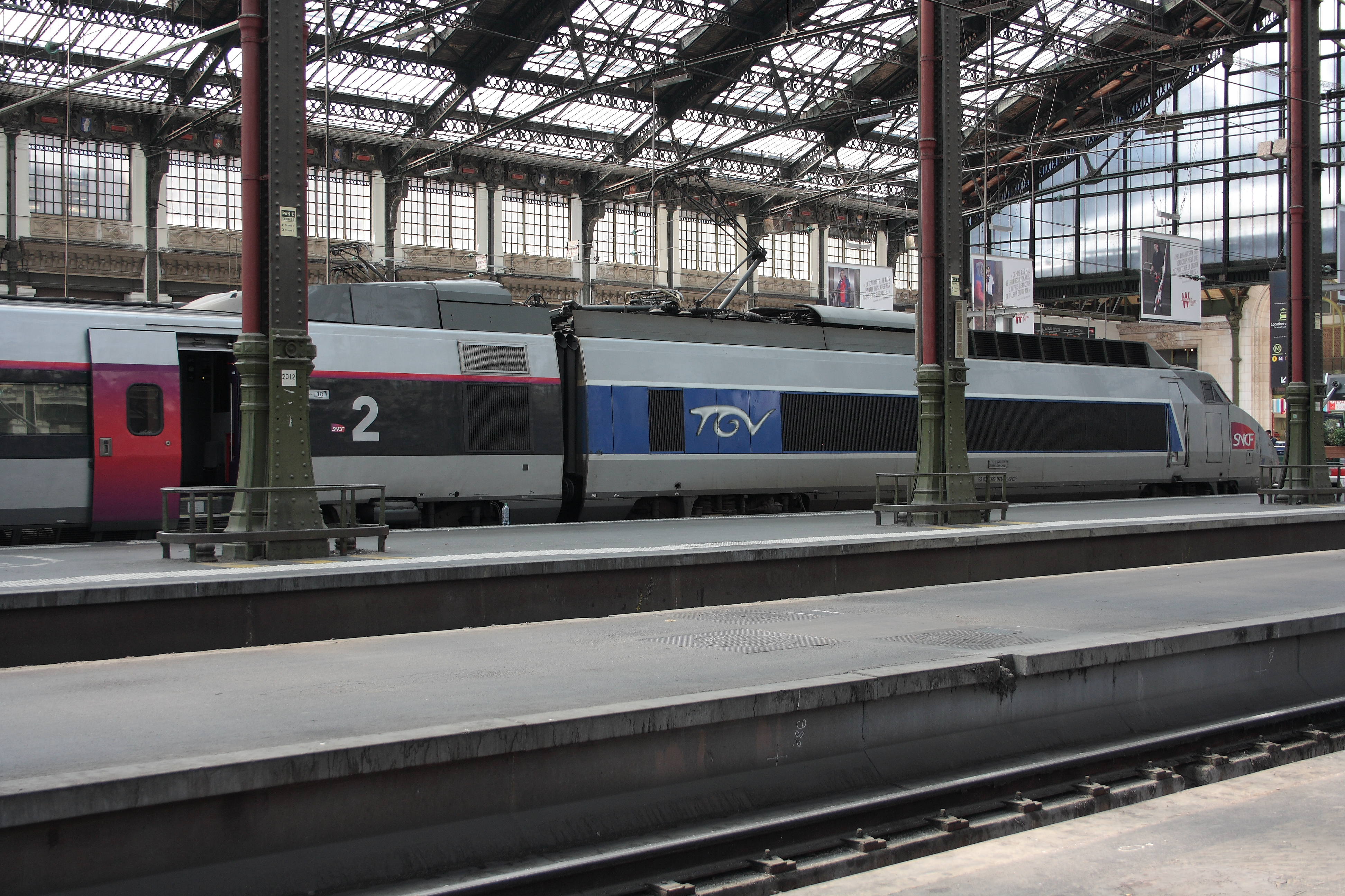 À la suite d'un incendie sur sa motrice 23118 le 20 février 2015 (puis radiée le 16 juin 2015) près de Vaulx-Milieu (38), la rame TGV Sud-Est n° 59 (en livrée Carmillon) a circulé jusqu'en novembre 2016 avec la motrice 23071 (issue de la rame 36 ; en livrée Atlantique).Les remorques de cette rame 59 sont désormais accrochées aux motrices de la rame 20.